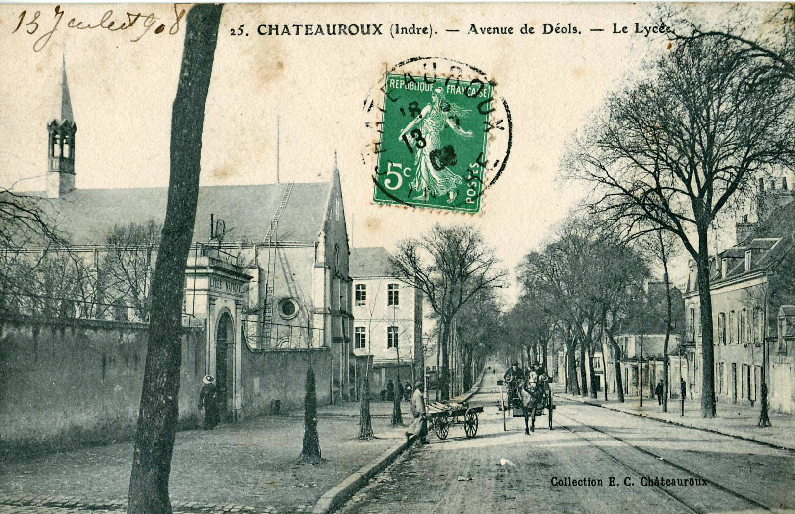 Carte postale ancienne éditée par E. C. à Chateauroux :CHATEAUROUX : Avenue de Déols - Le Lycée